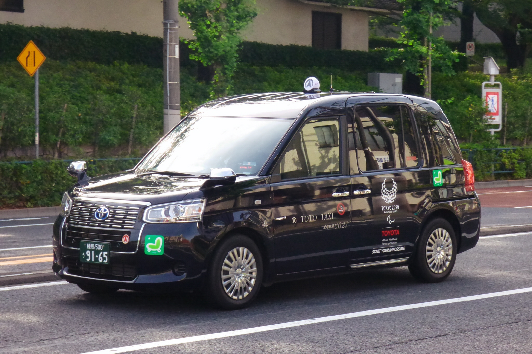 東都自動車のジャパンタクシー